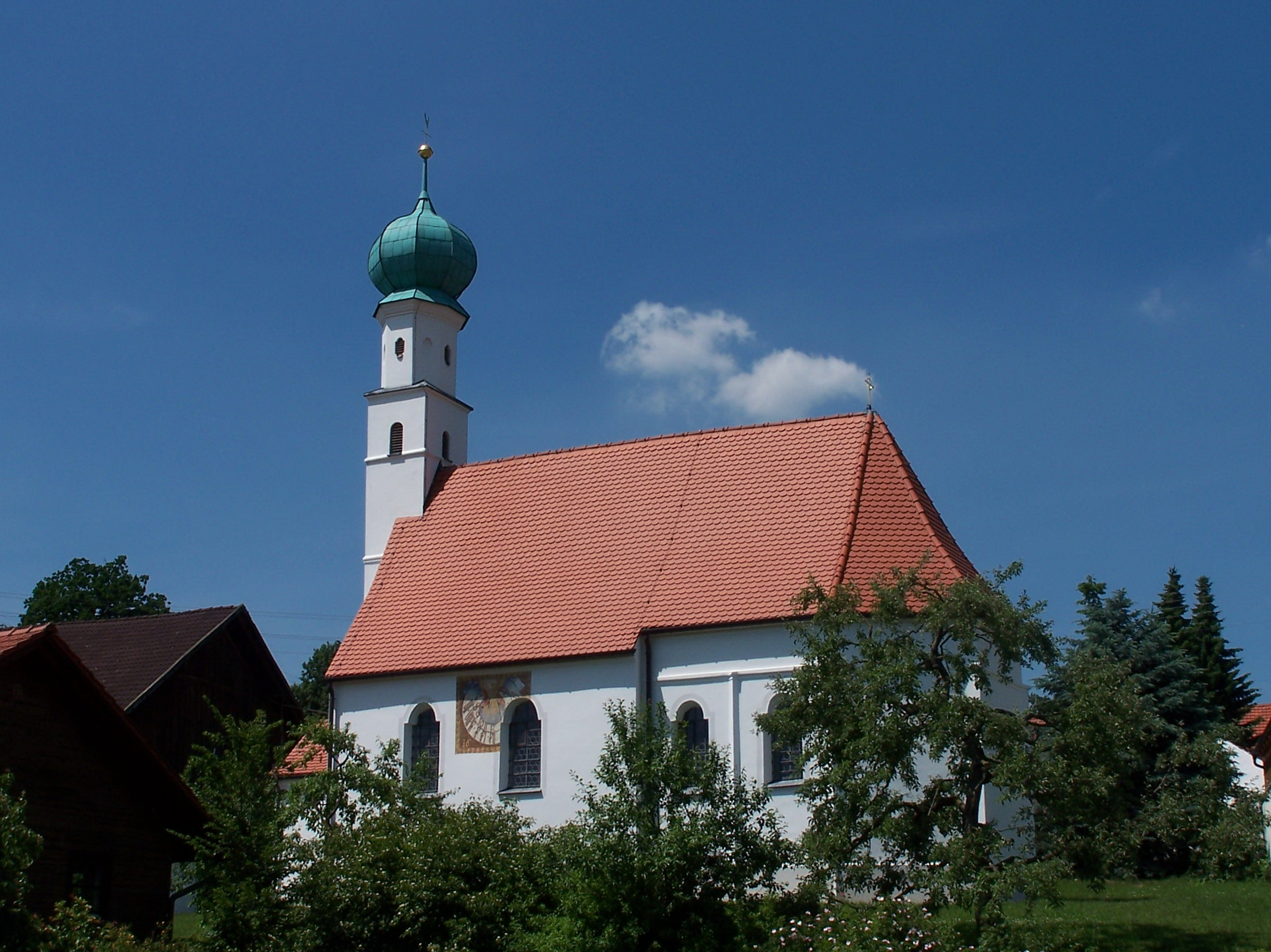 Weng Hörmannsdorf, Halbergstraße 2. Katholische Kirche St. Barbara, spätgotisch, Mitte 15. Jahrhundert, barockisiert 1695; mit Ausstattung.